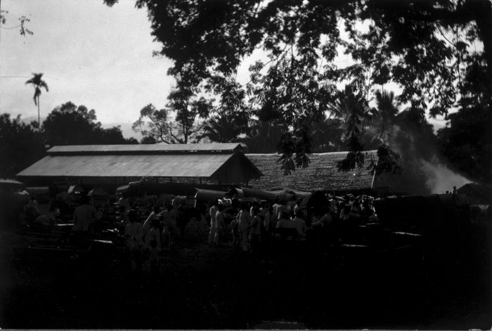 Foto. Pasar in Ajermadidi.